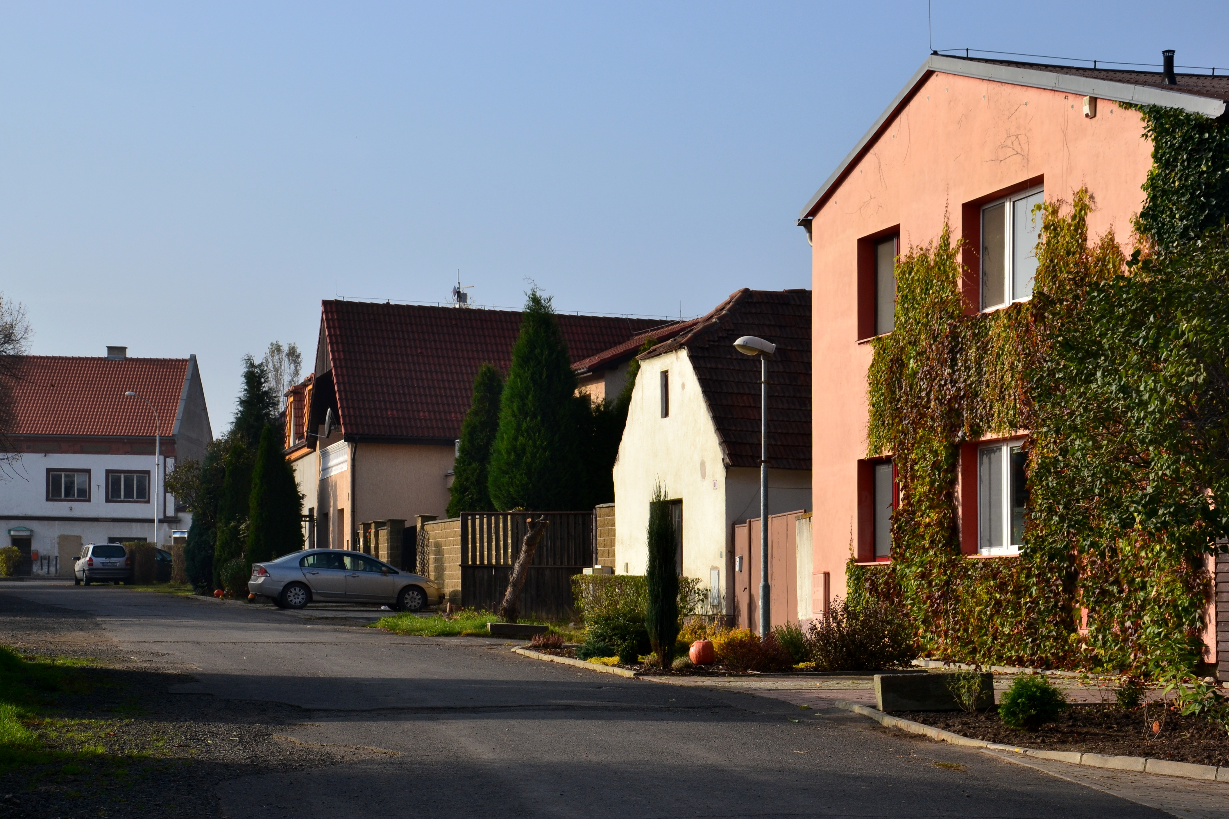 Všestudy - domy u kostela